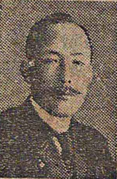 박중양 충북도지사